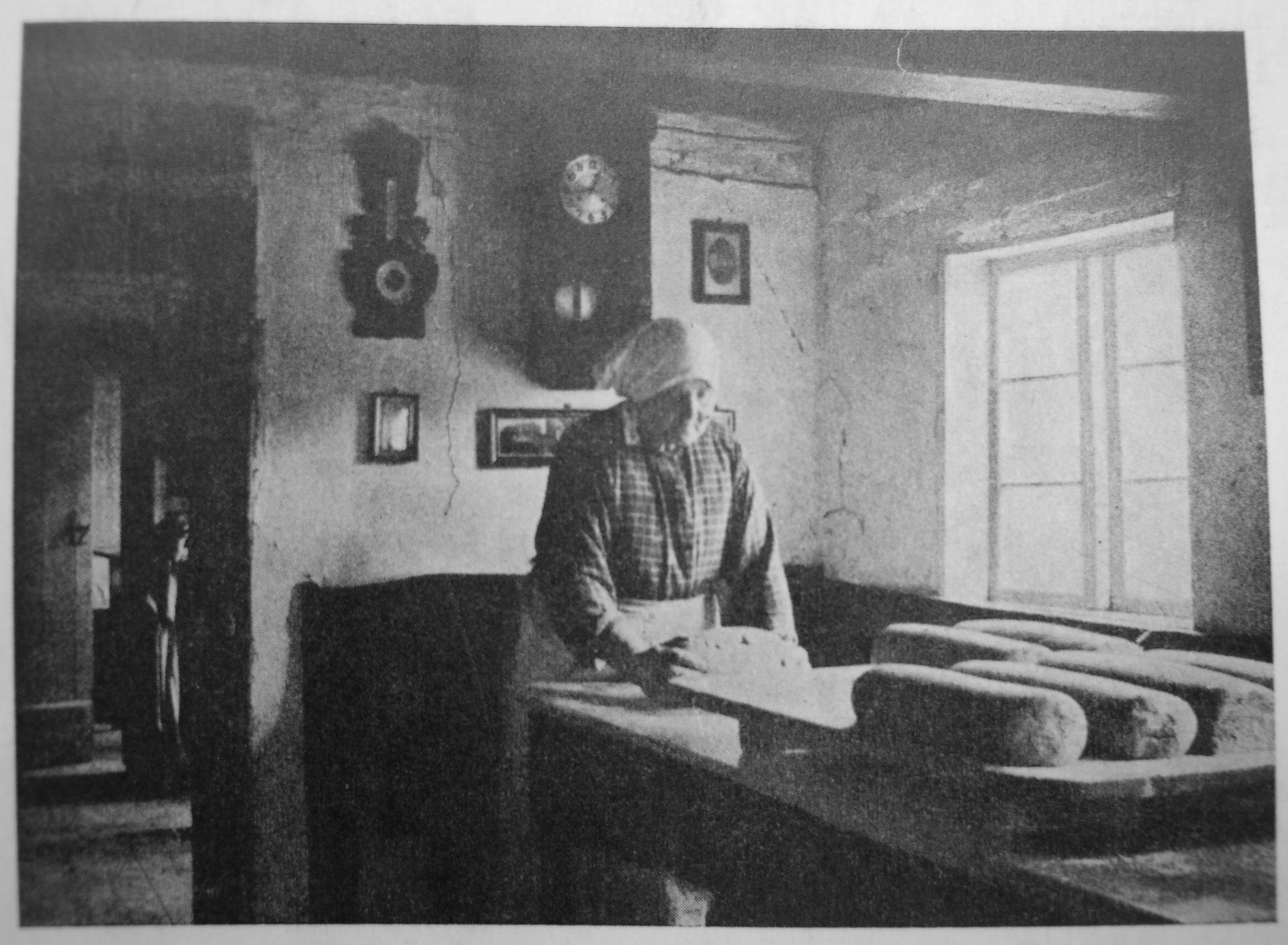 Grovbrød slås op. Kølvrå ved Karup